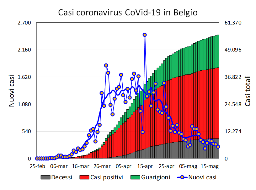 Andamento giornaliero dei casi relativi alla pandemia di COVID-19. Sono evidenziati decessi, guarigioni, casi attivi e nuovi casi giornalieri.